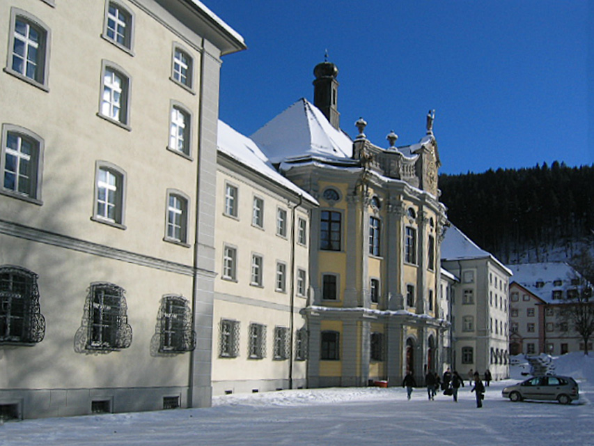 Blick auf die Altbaupforte des Kollegs St. Blasien, selbst fotografiert (EBB, 28.2.2005)